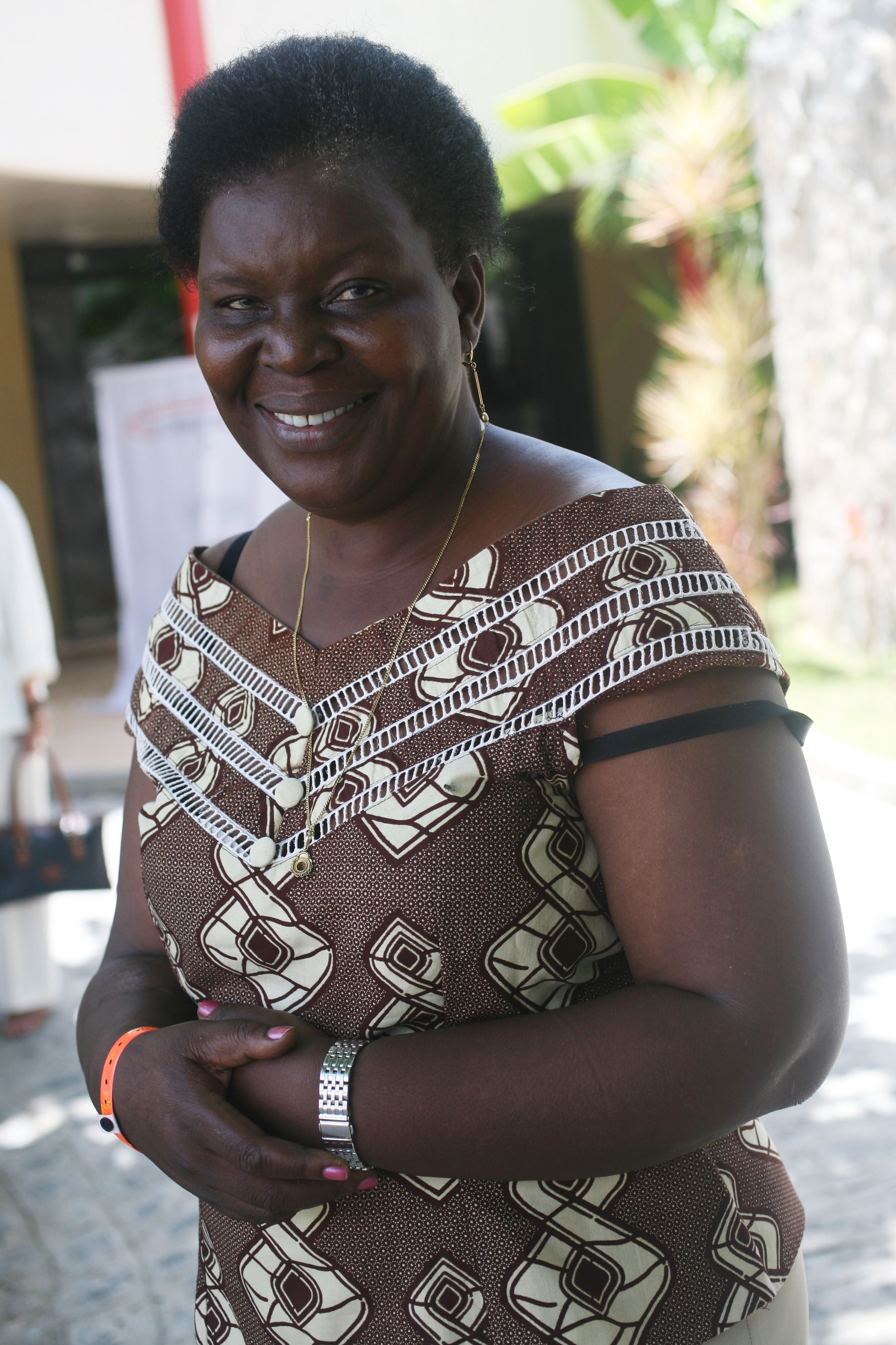 08.11.2008. Ipojuca. Crdito: Otavio de Souza. Palestra sobre a Literatura de Cabo Verde durante a IV Festa Literria Internacional de Porto de Galinhas na praia de Porto de Galinhas. Escritora moanbicana Paulina Chiziane.